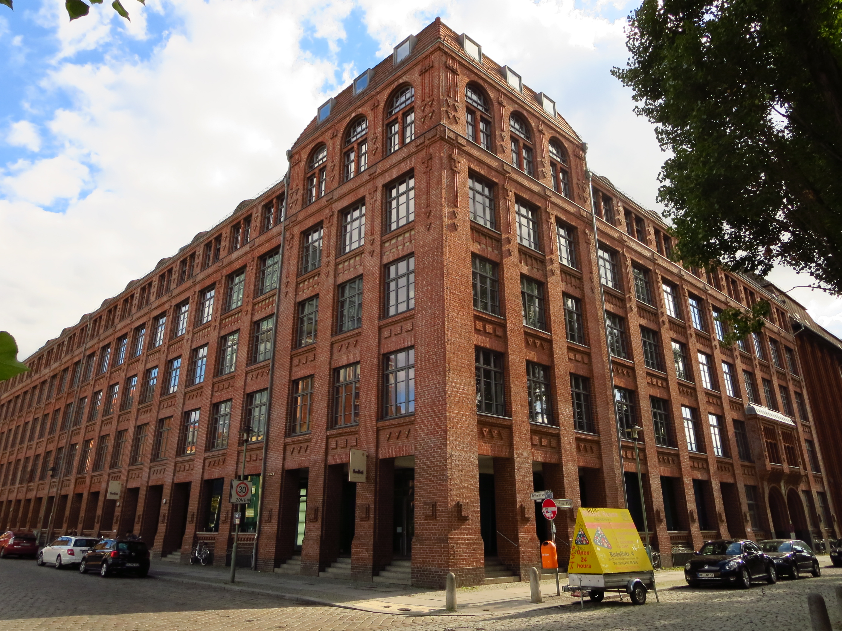 Narva-Gebäude V, Nordecke